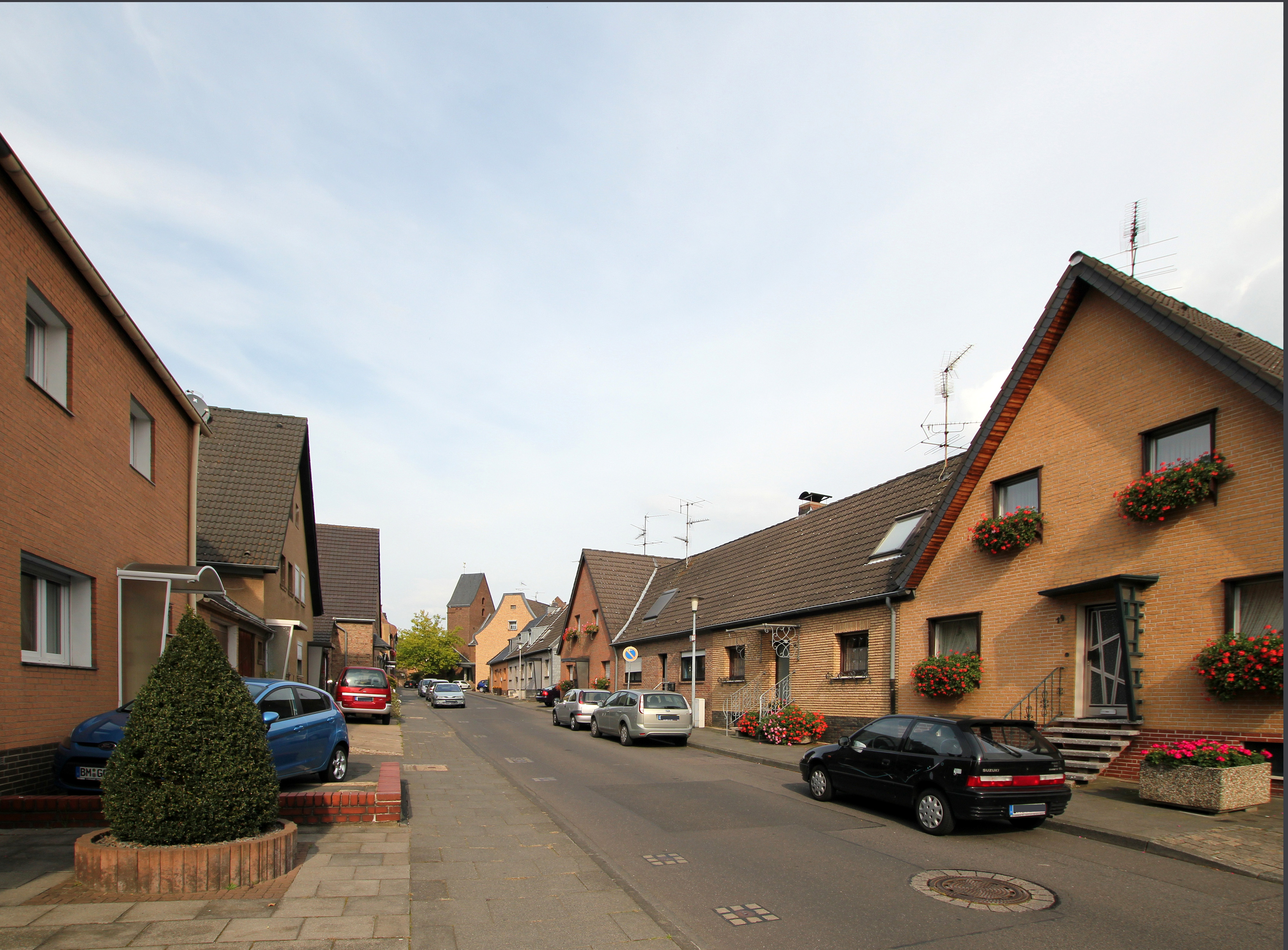 Erftstadt-Köttingen, Ortsbild Kirchstraße